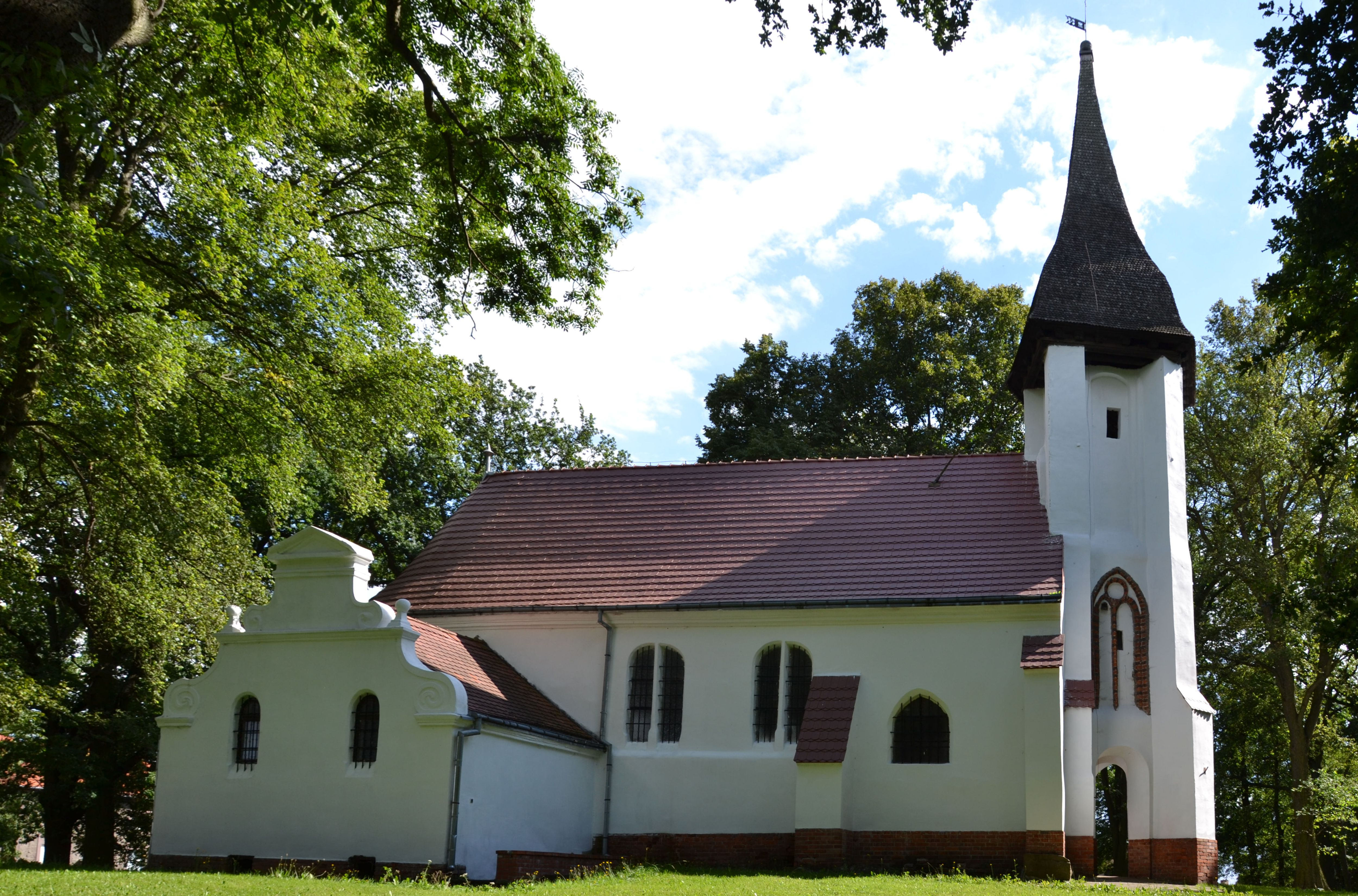 Kościół św. Mikołaja w Kamieniu Pomorskim